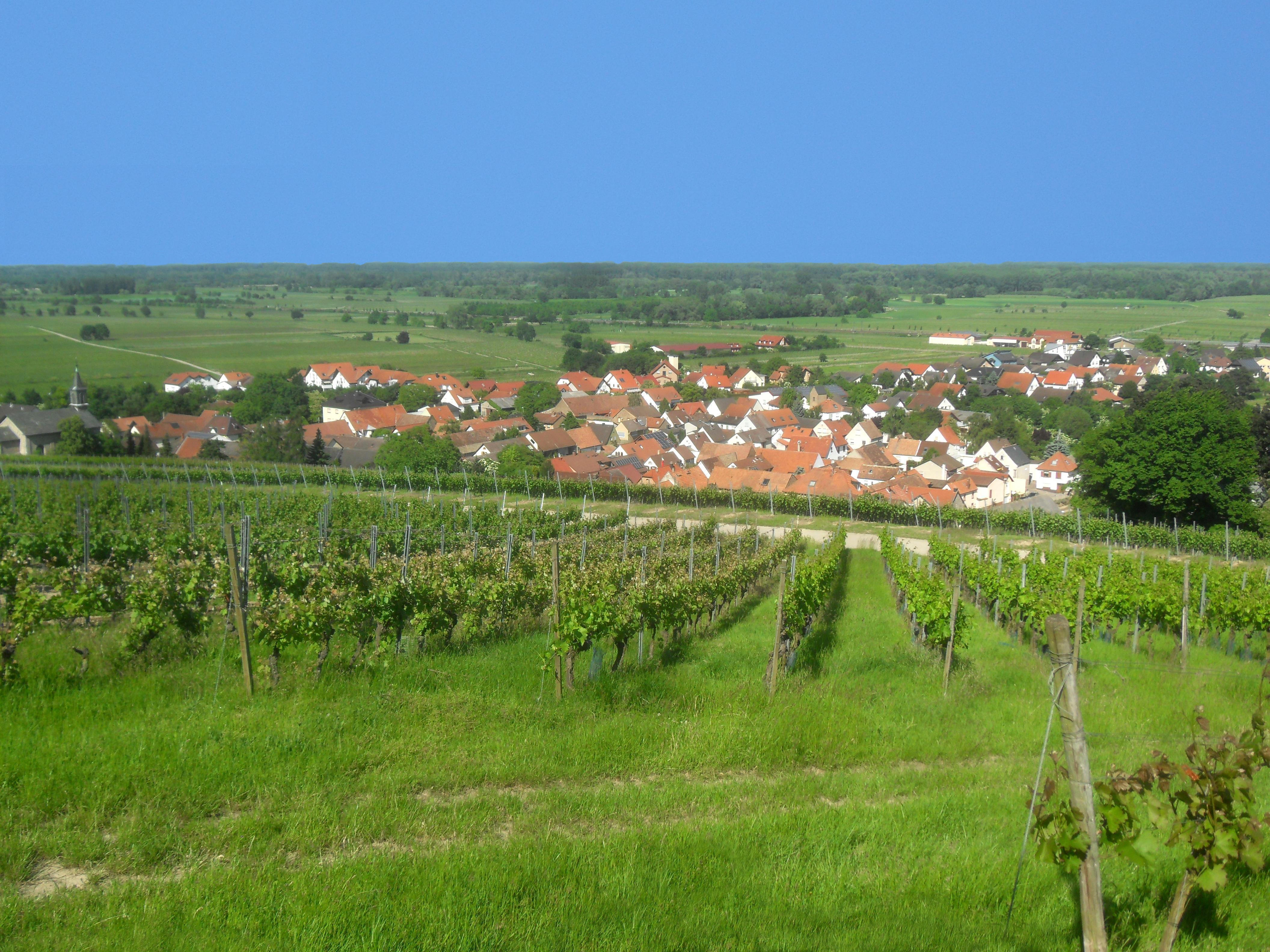 Die rheinhessische Ortsgemeinde Ludwigshöhe in Rheinland-Pfalz (Deutschland) von den westlichen Weinbergen aus